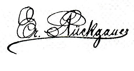 Unterschrift von Erasmus Rückgauer